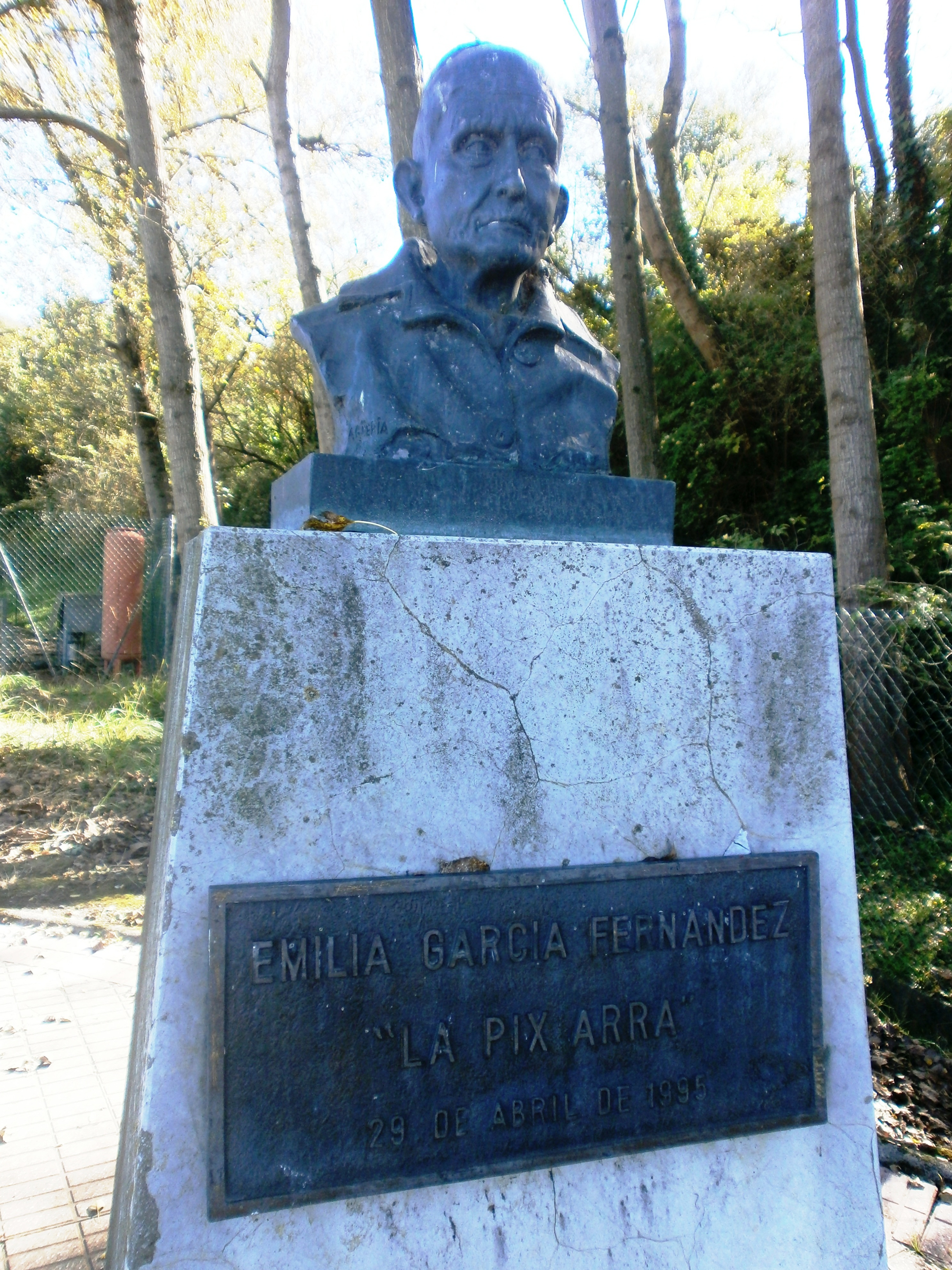 Esculturas en Oviedo al aire libre